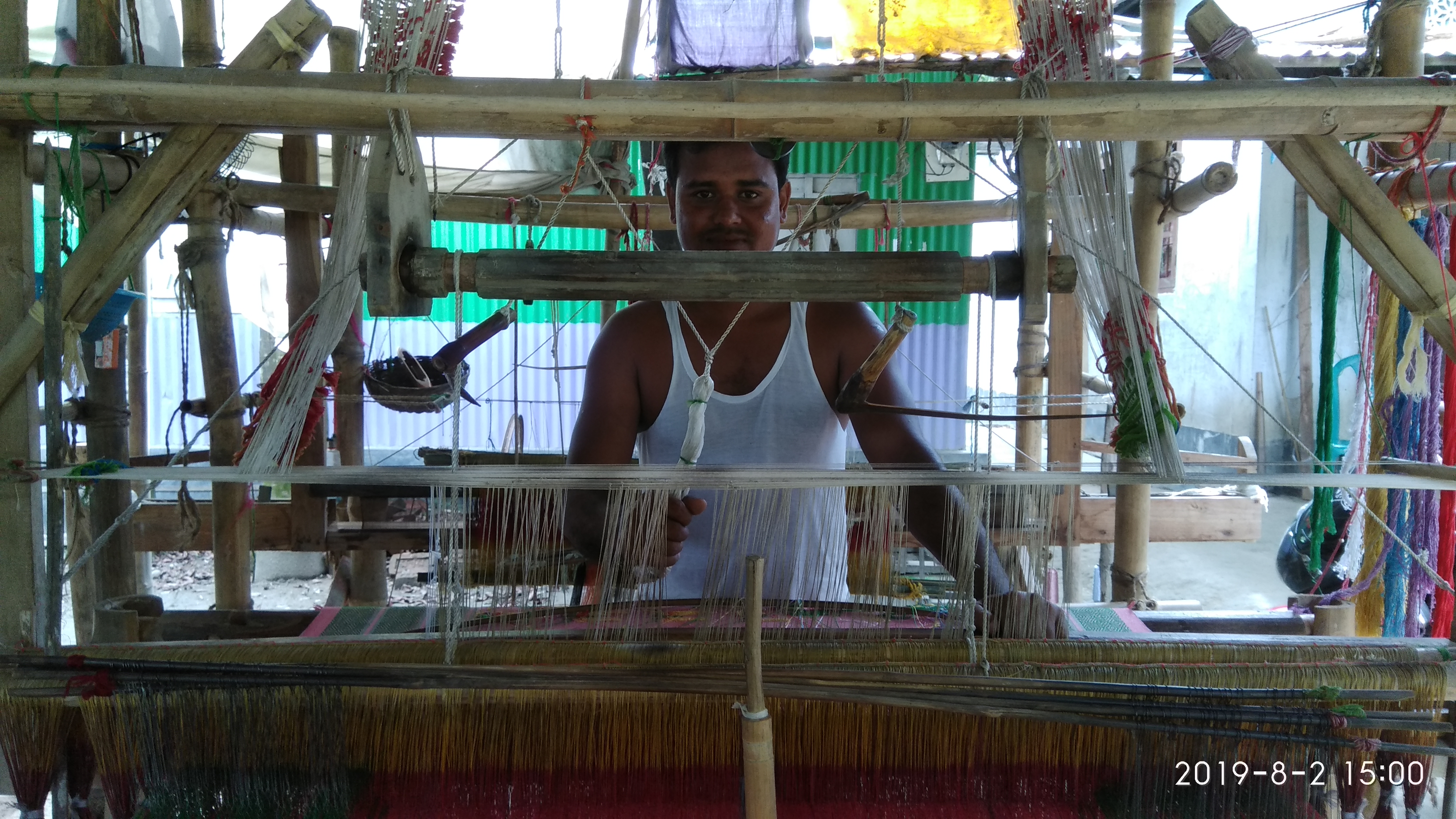 অসমীয়া: তাঁত শালত কাম কৰি থকা বয়ন শিল্পী আৰু শিল্প